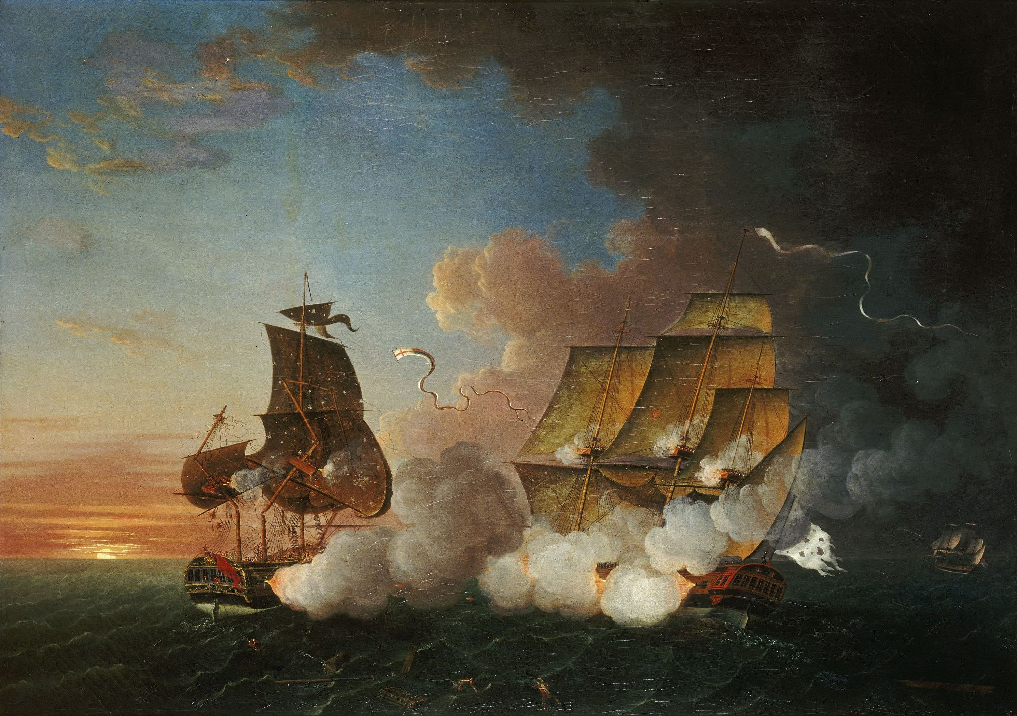 Le 11 septembre 1778, au large d'Ouessant, la frégate de 32 canons la Junon commandée la frégate anglaise de 28 canons HMS Fox. Après quelques heures de combat le HMS Fox, démâté, cesse de tirer. La Junon le remorque jusqu'à Brest.